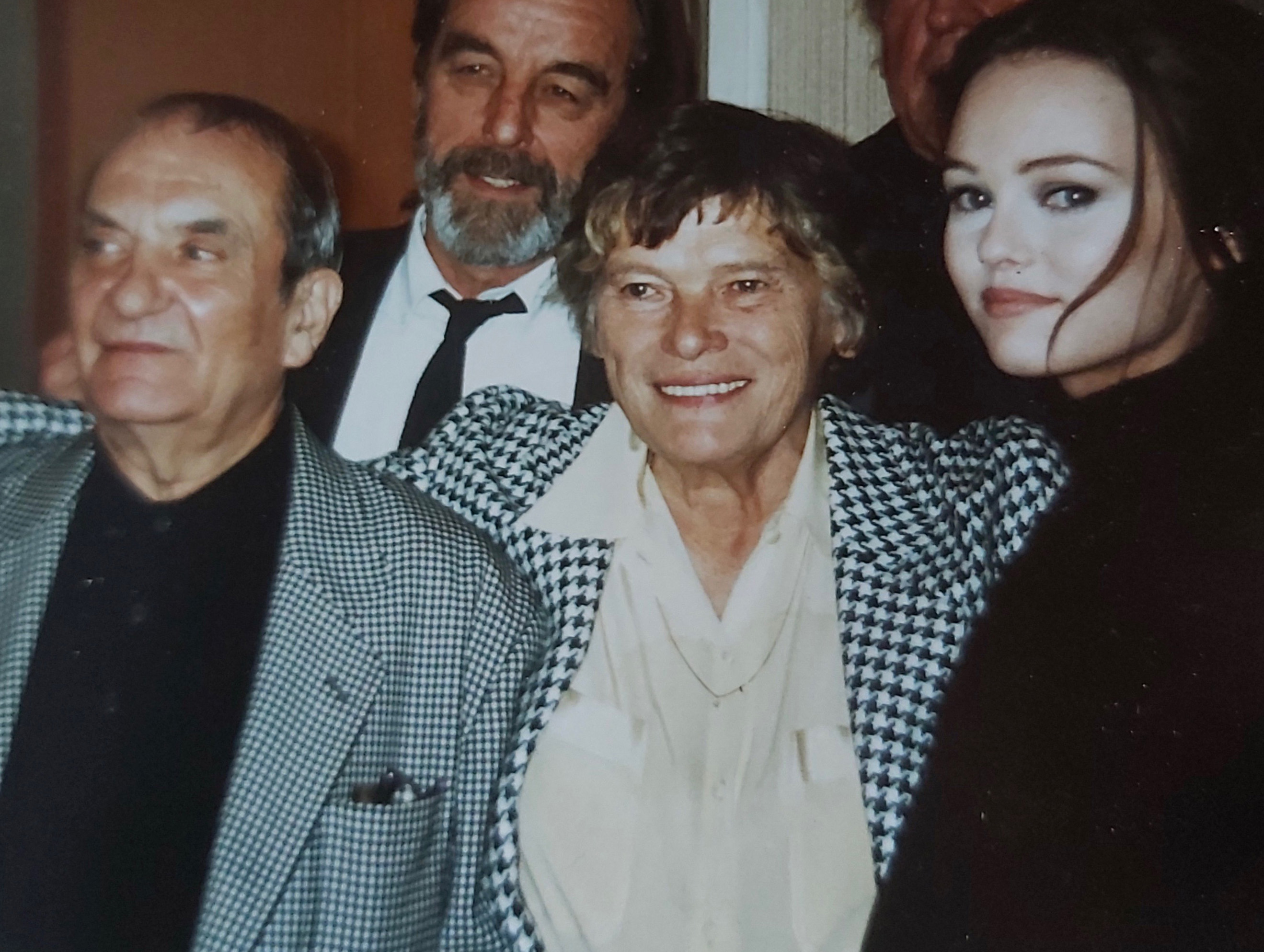 70ème anniversaire de l'agent Marceline Lenoir organisé par son associé, Chantal Philippart